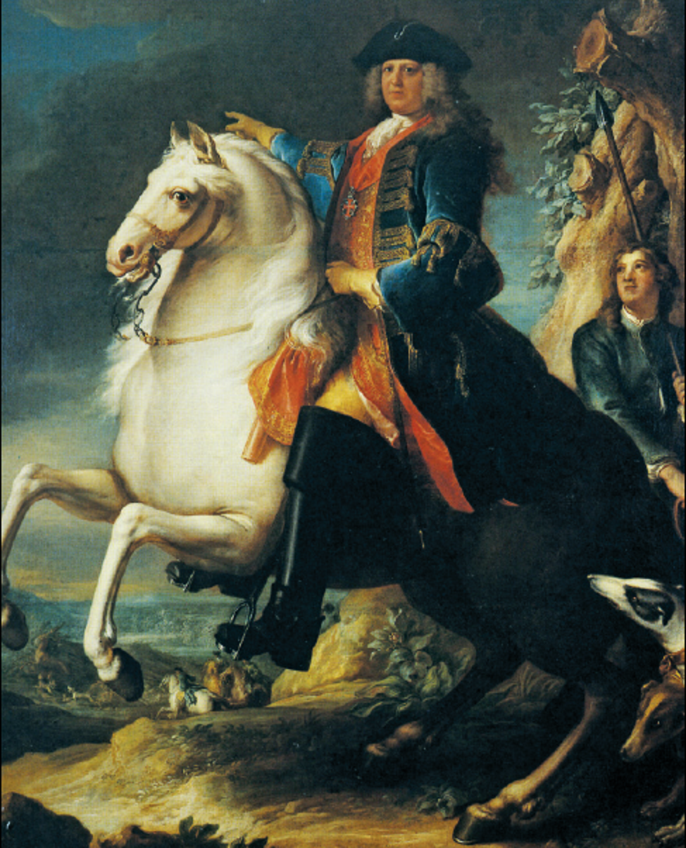 Retrato de D. Jaime Álvares Pereira de Melo, III Duque de Cadaval, depois da morte do seu pai, a 27 de Janeiro de 1727